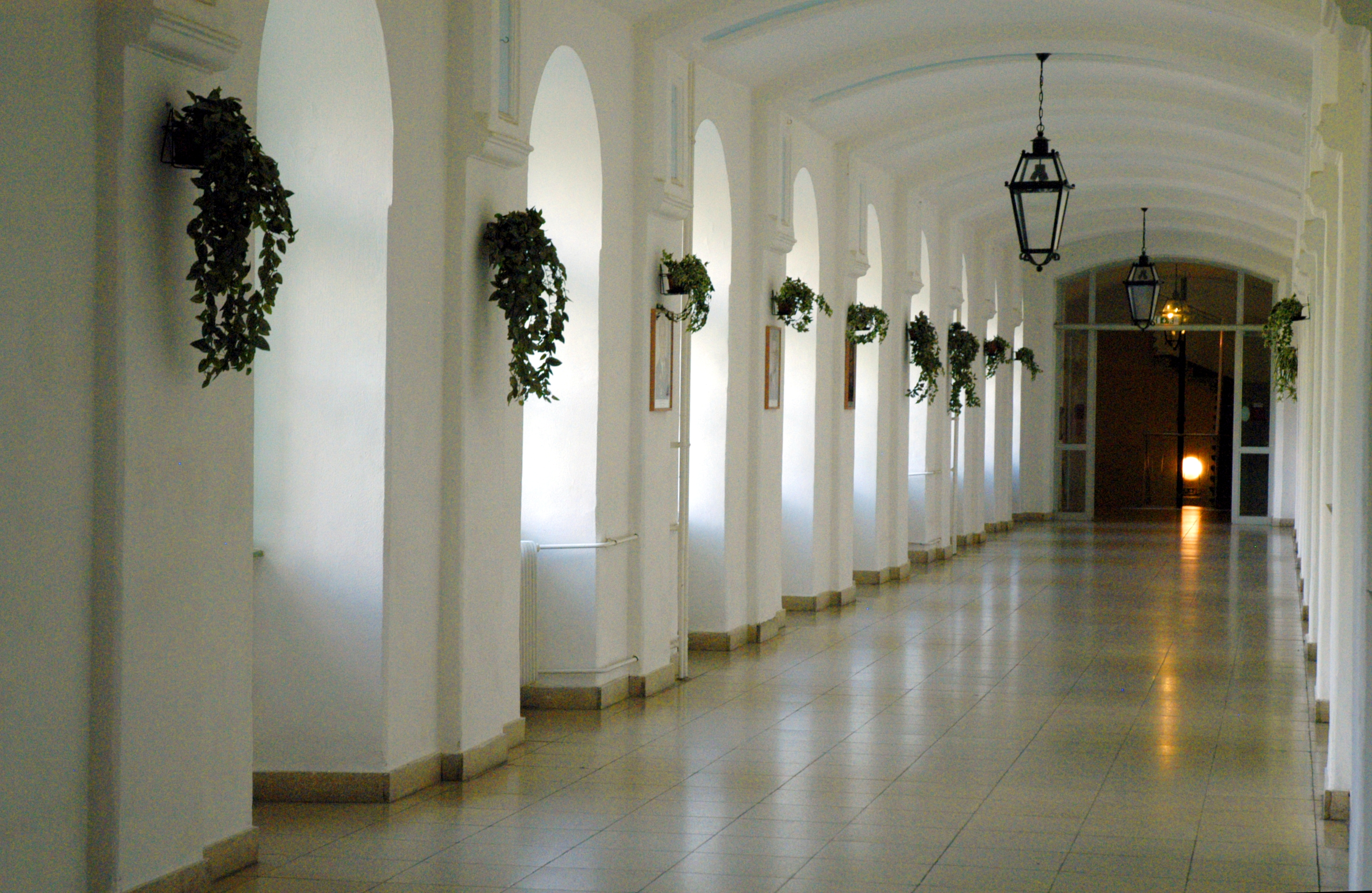 Martin-Kaserne, Gang im 1. Obergeschoss des Osttraktes